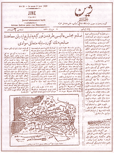 Η κουρδική εφημερίδα Ζιν του 1920 με τα άρθρα 62 - 64 της Συνθήκης των Σεβρών.